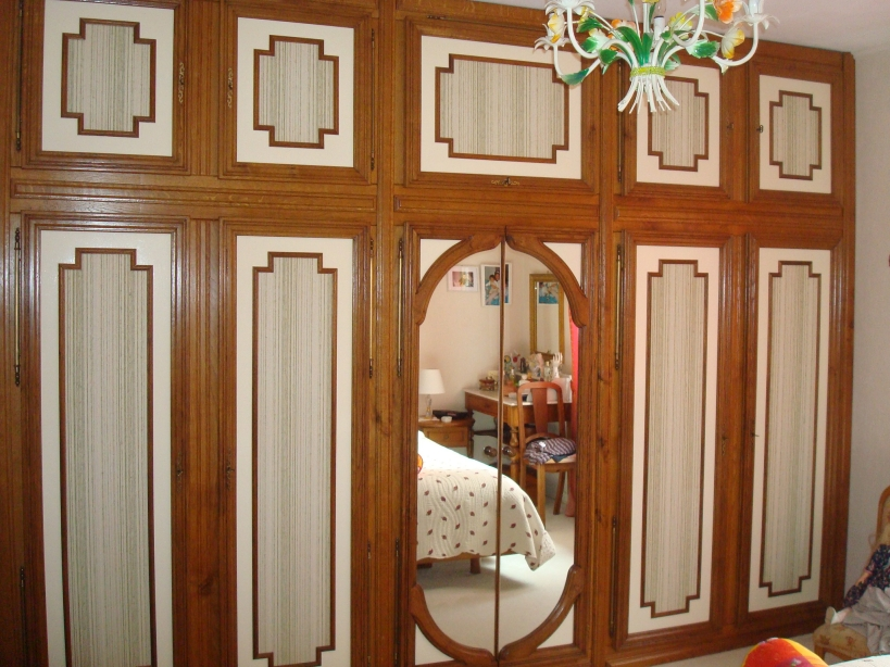 Placard de chambre à coucher avec miroir.